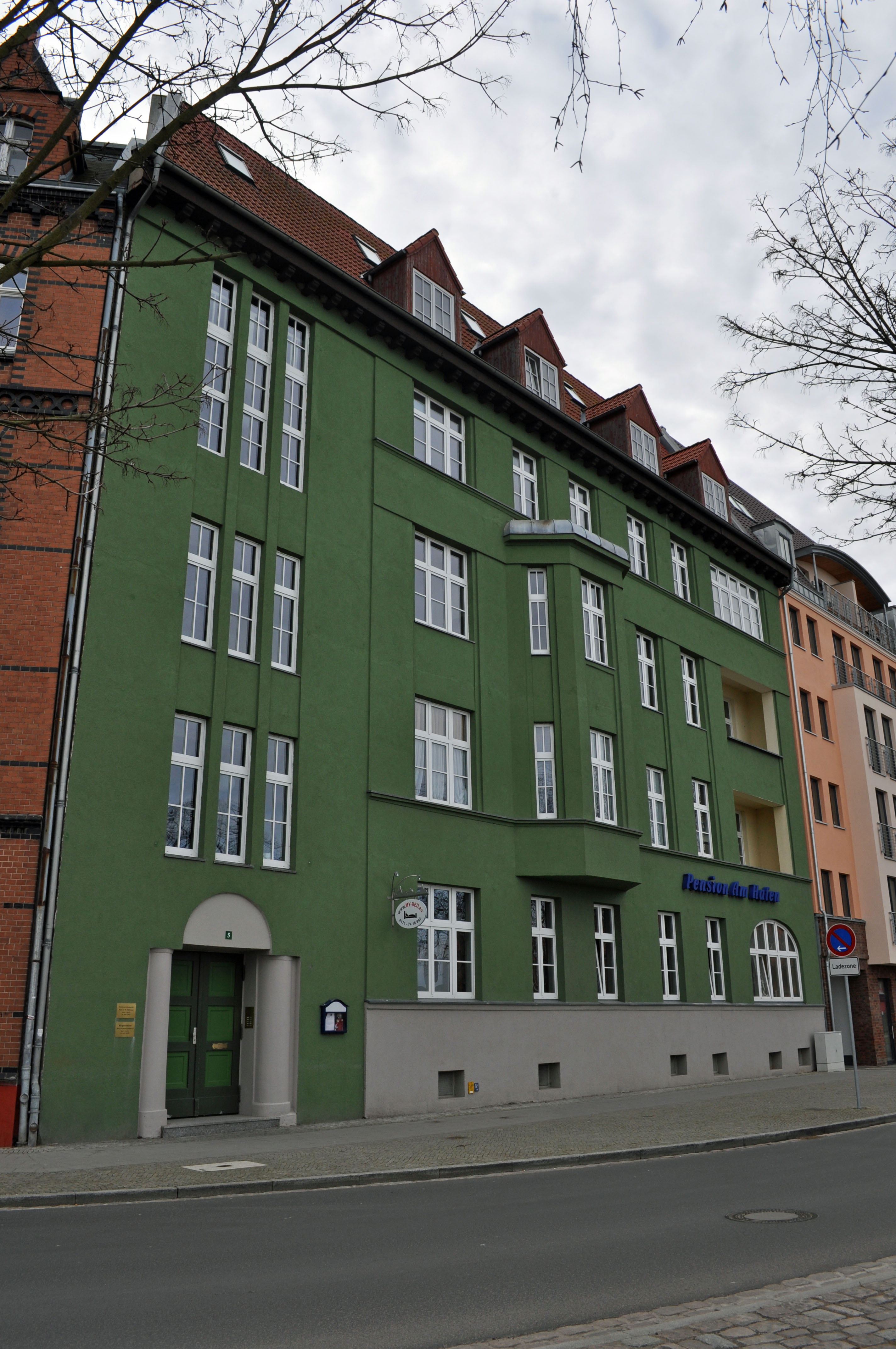 Gebäude bzw. Gebäudedetail in Stralsund. Straße und Hausnummer siehe Dateiname.